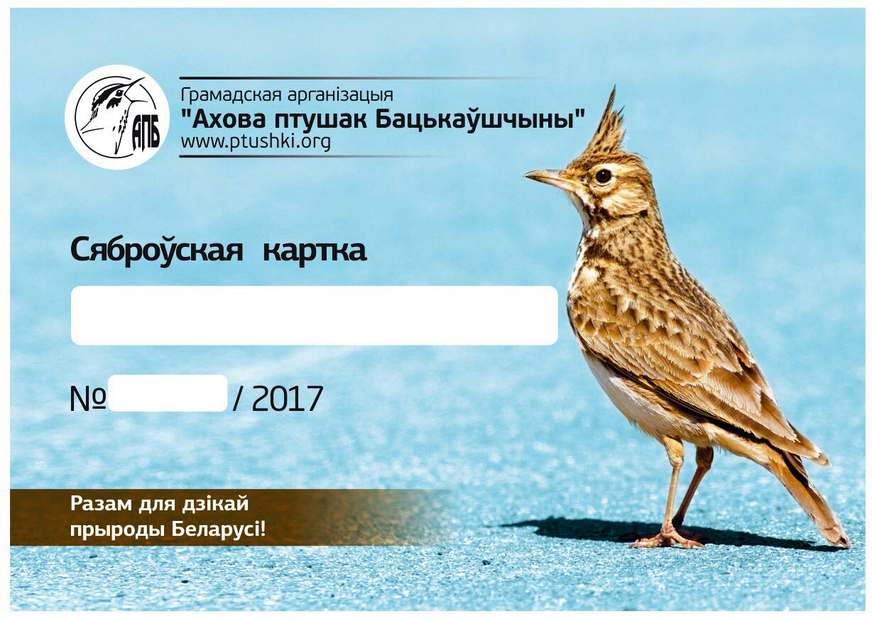 Сяброўская картка АПБ 2017 года.